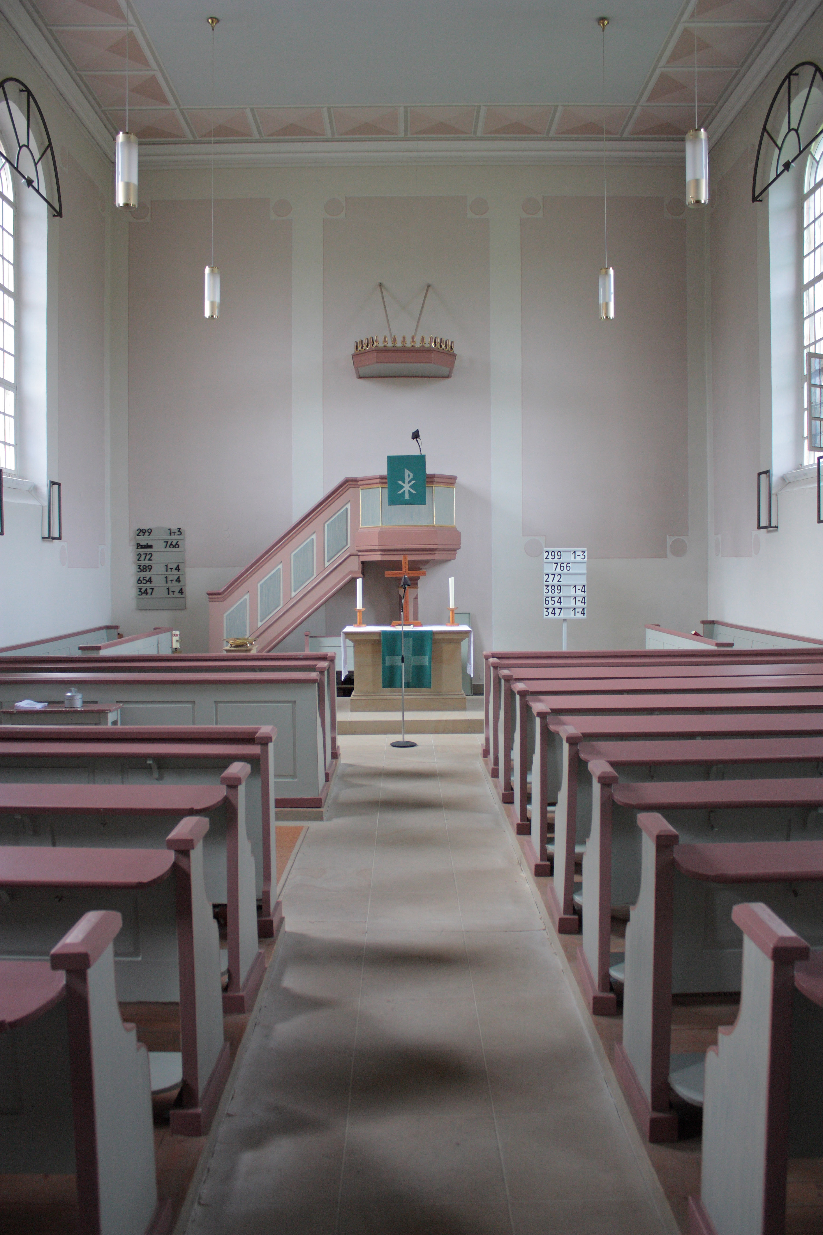 kirche mannweiler-cölln, schiff, innenraum blick altar